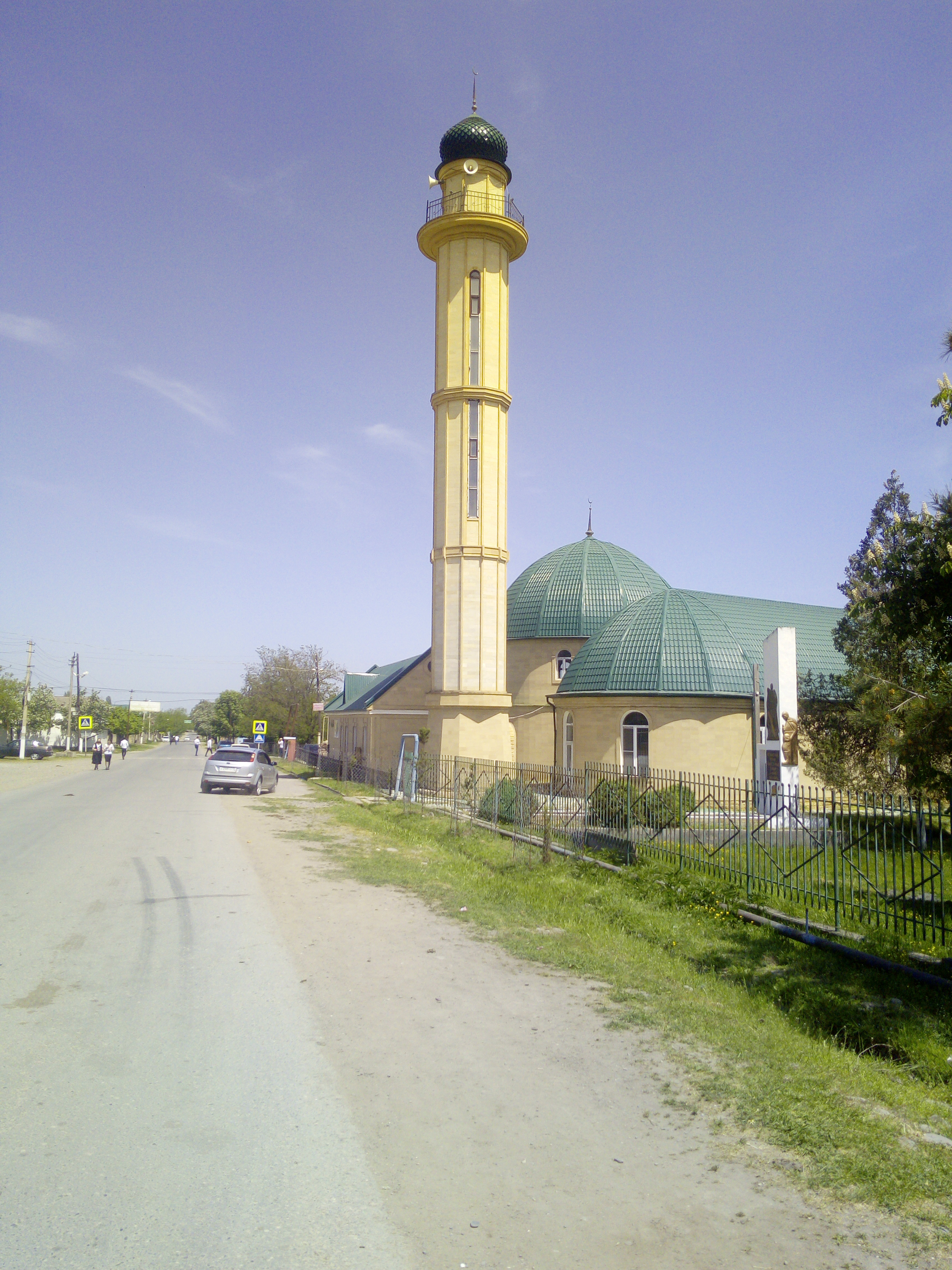 Минарет мечети с. Яраг, ул. им. М. Ярагского